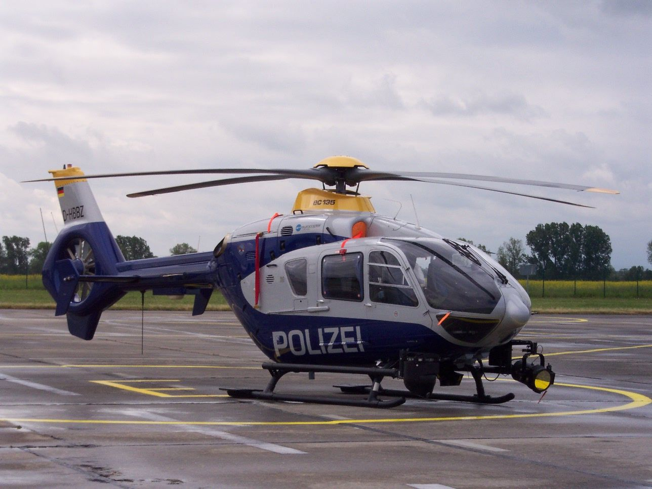 Eurocopter EC 135 P2, ILA 2006